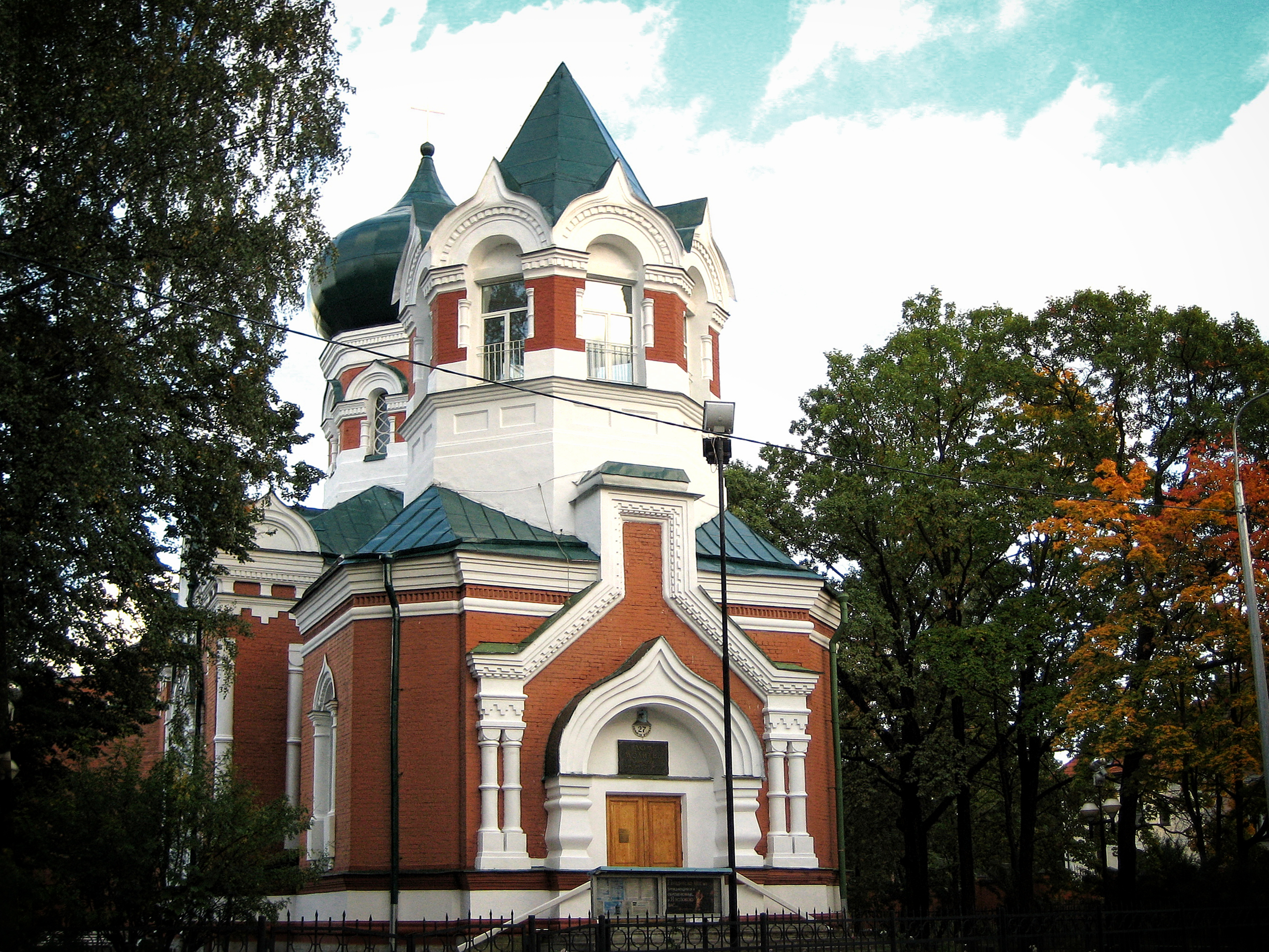 Санкт-Петербург. Церковь Святой Живоначальной Троицы. 1900-1904гг на Большой Озерной ул.